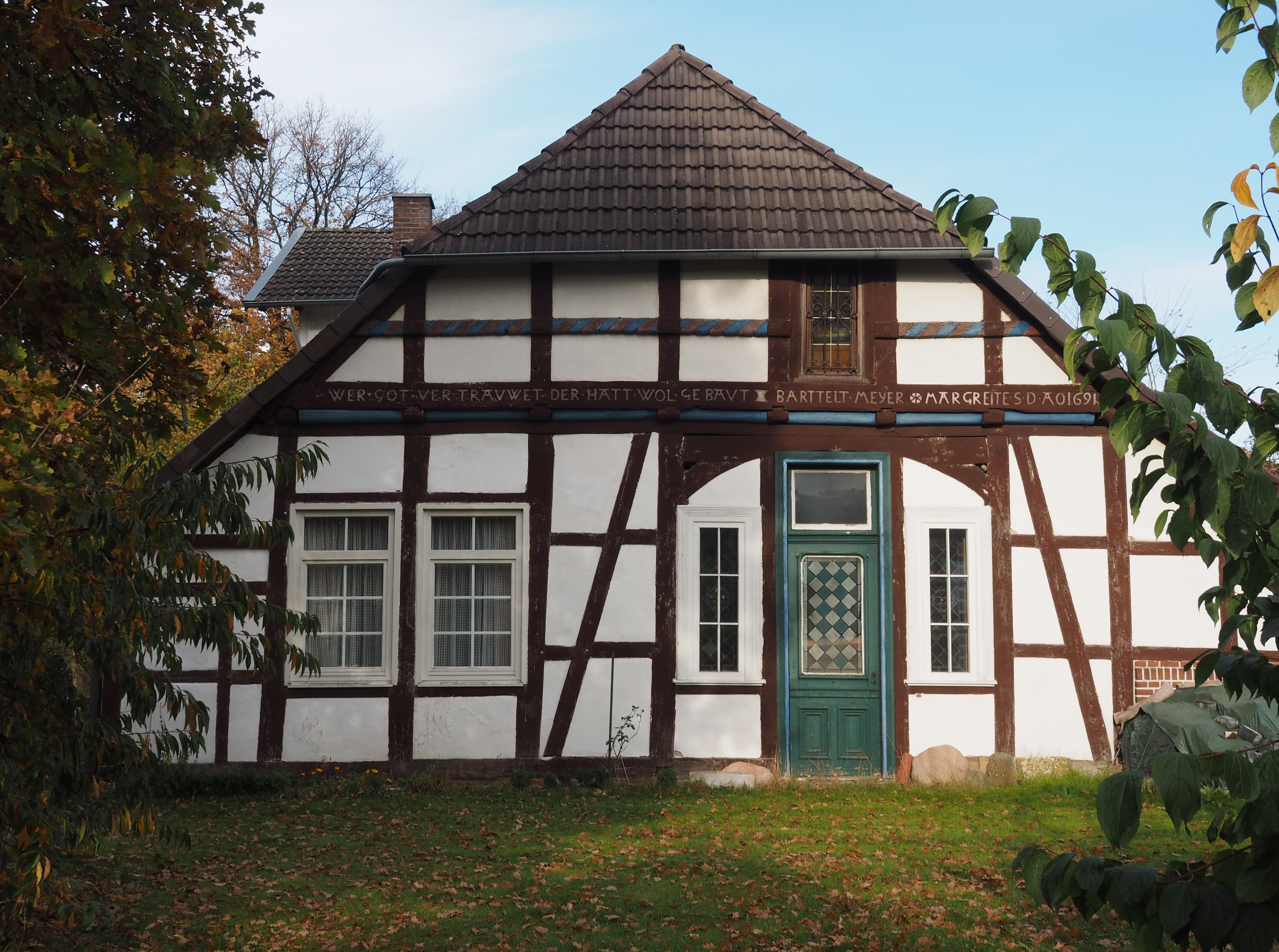 Fachwerkhaus von 1691 in Eicklingen, Samtgemeinde Flotwedel